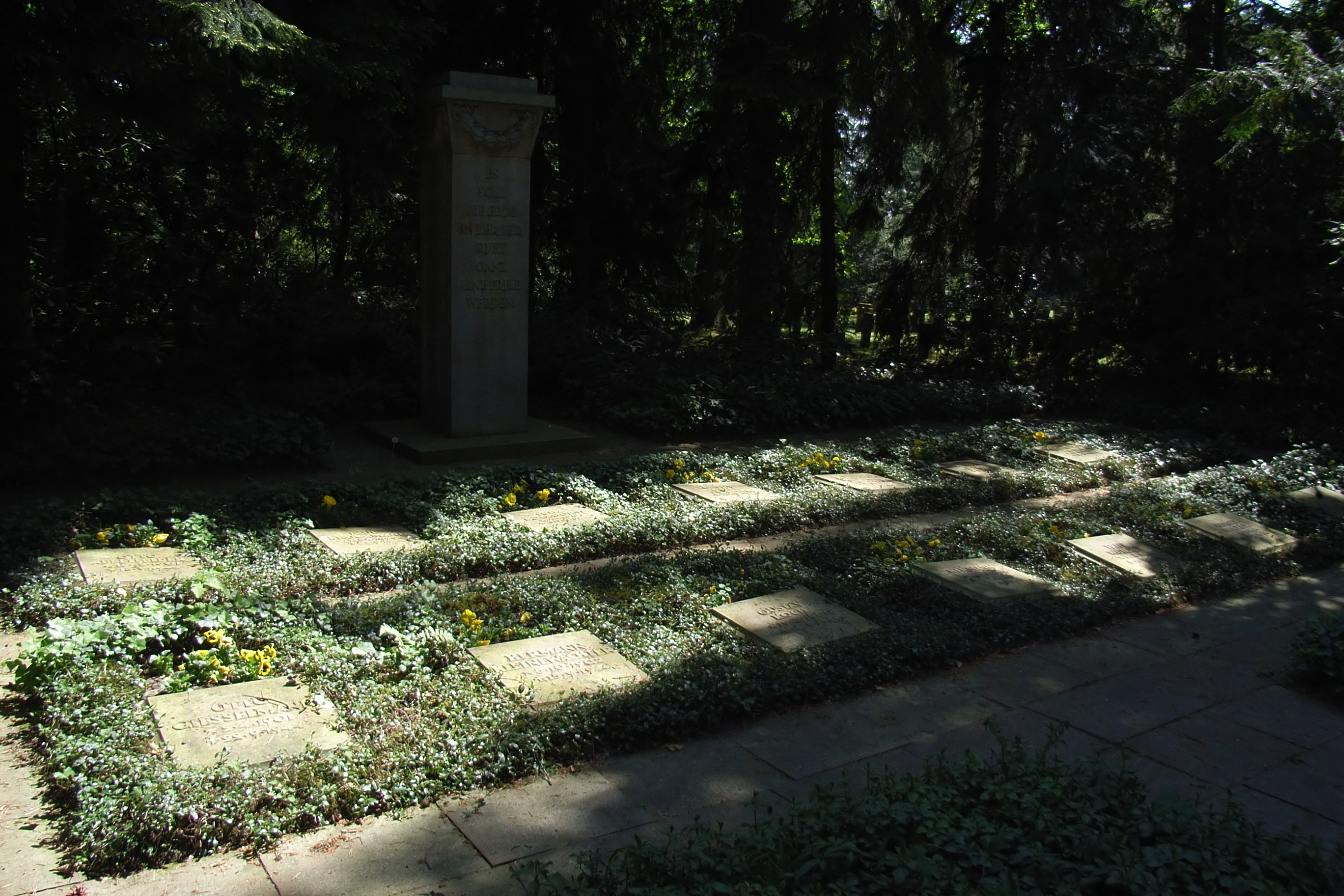 Bielefeld, Deutschland: Mahn- und Ehrenanlage auf dem Sennefriedhof für die Opfer der NS-Gewaltherrschaft. Hier ruhen 15 Widerstandskämpfer, die 1944 in Bielefeld zum Tode verurteilt und umgebracht wurden.